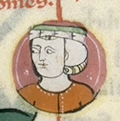 William, Count of Sully